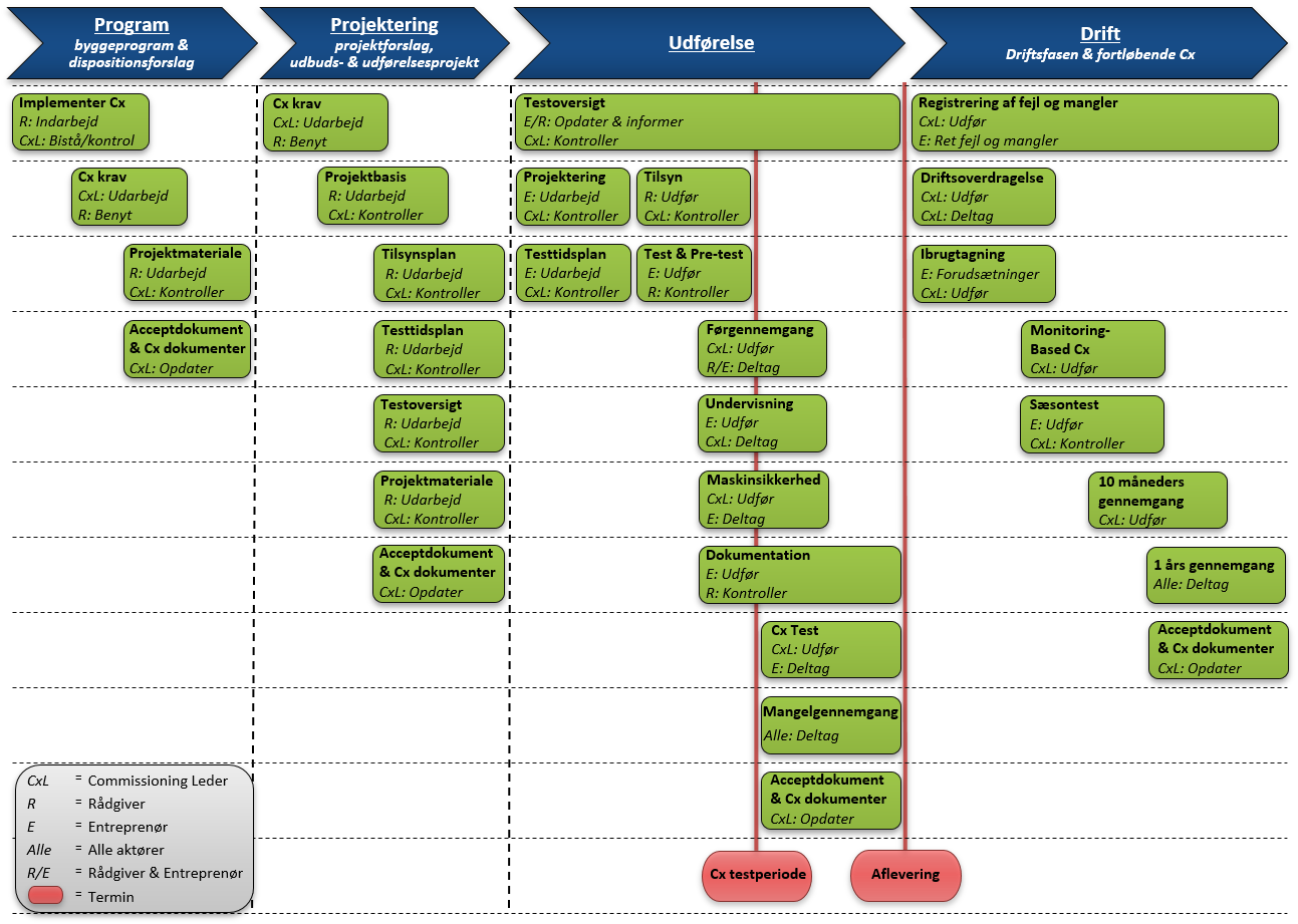 Overblik over faserne i Commissioning processen og de dertilhørende aktiviteter